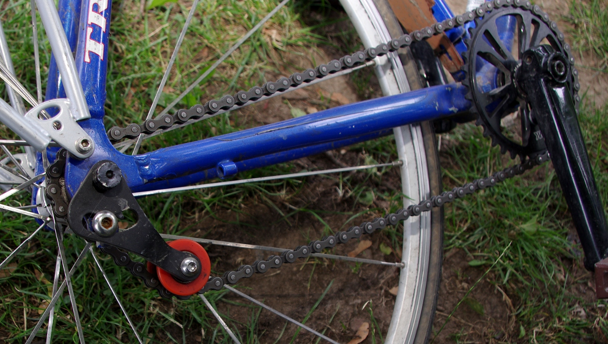 Eine Kettenspannvorrichtung für Räder ohne Kettenschaltung.